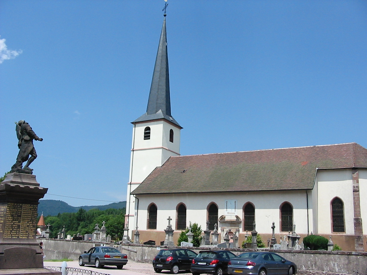 L'église de Taintrux et le monument aux morts.